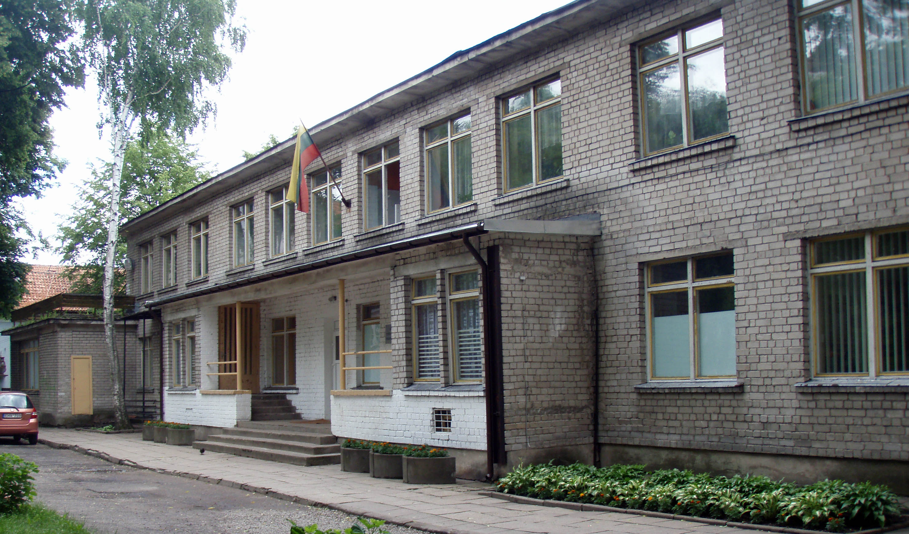 Vilniaus Vytės_Nemunėlio pradinė mokykla